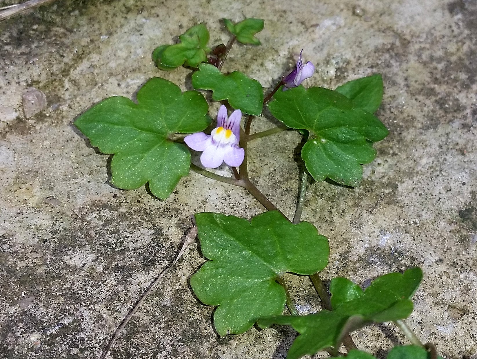 Cymbalaria muralis Anteriorment era descrita com Linaria cymbalaria